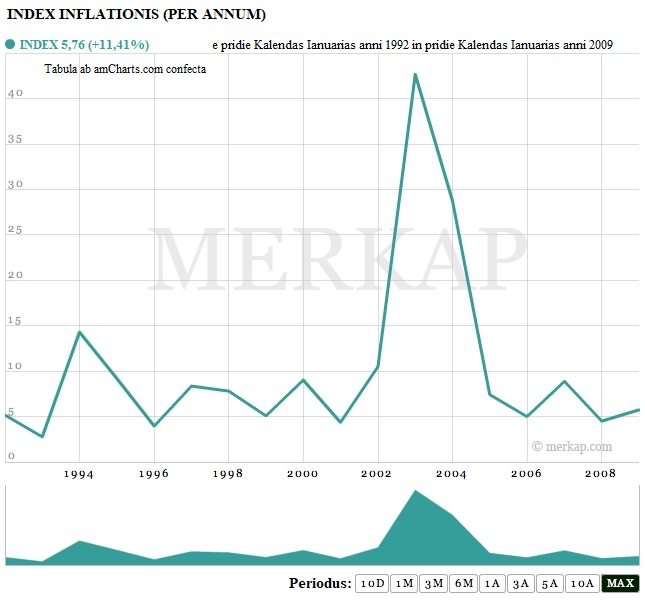 Index inflationis Rei publicae Dominicianae